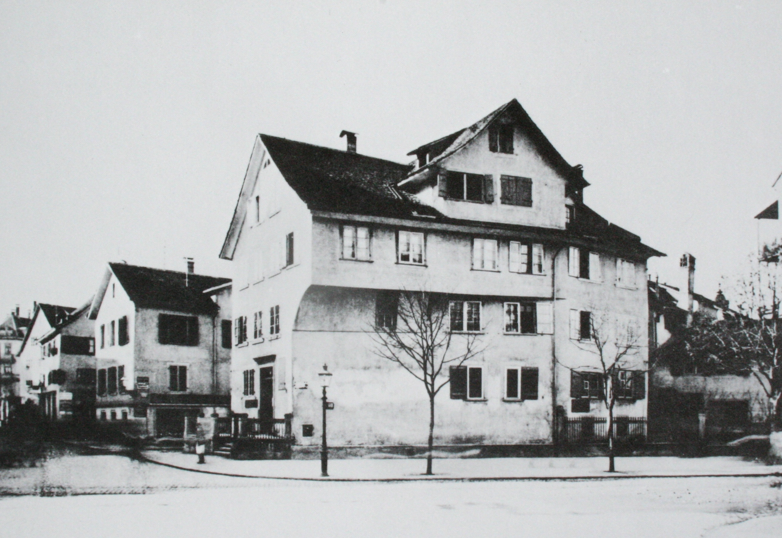 Haus zur Trülle an der Bahnhofstrasse um 1880